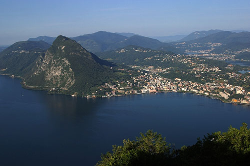 Lugano mit Monte San Salvatore (Lago di Lugano)